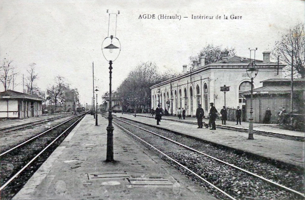 Intérieur de la gare vers 1910.